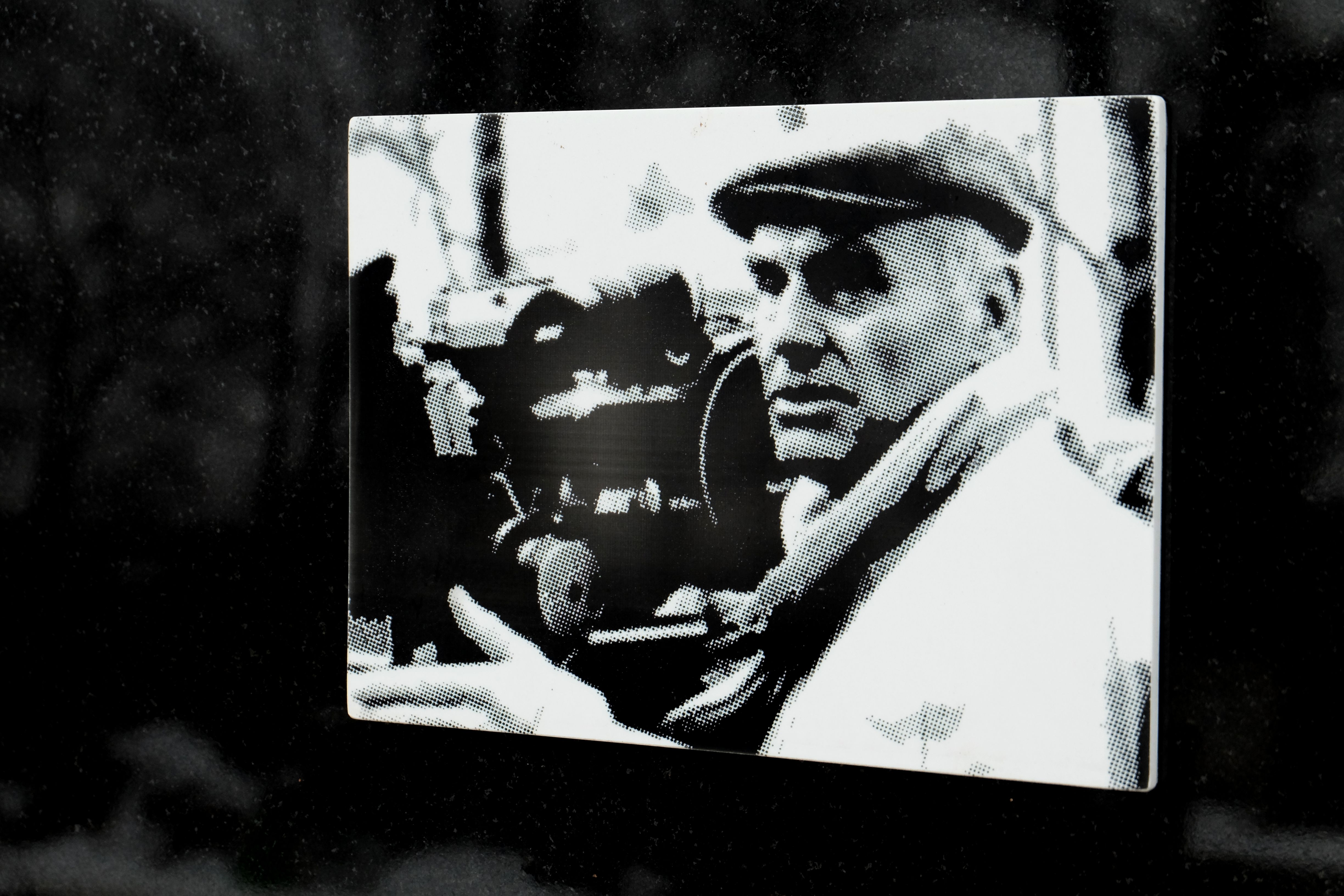 Grób reżysera Andrzeja Kotkowskiego na Cmentarzu Wojskowym na Powązkach w Warszawie.